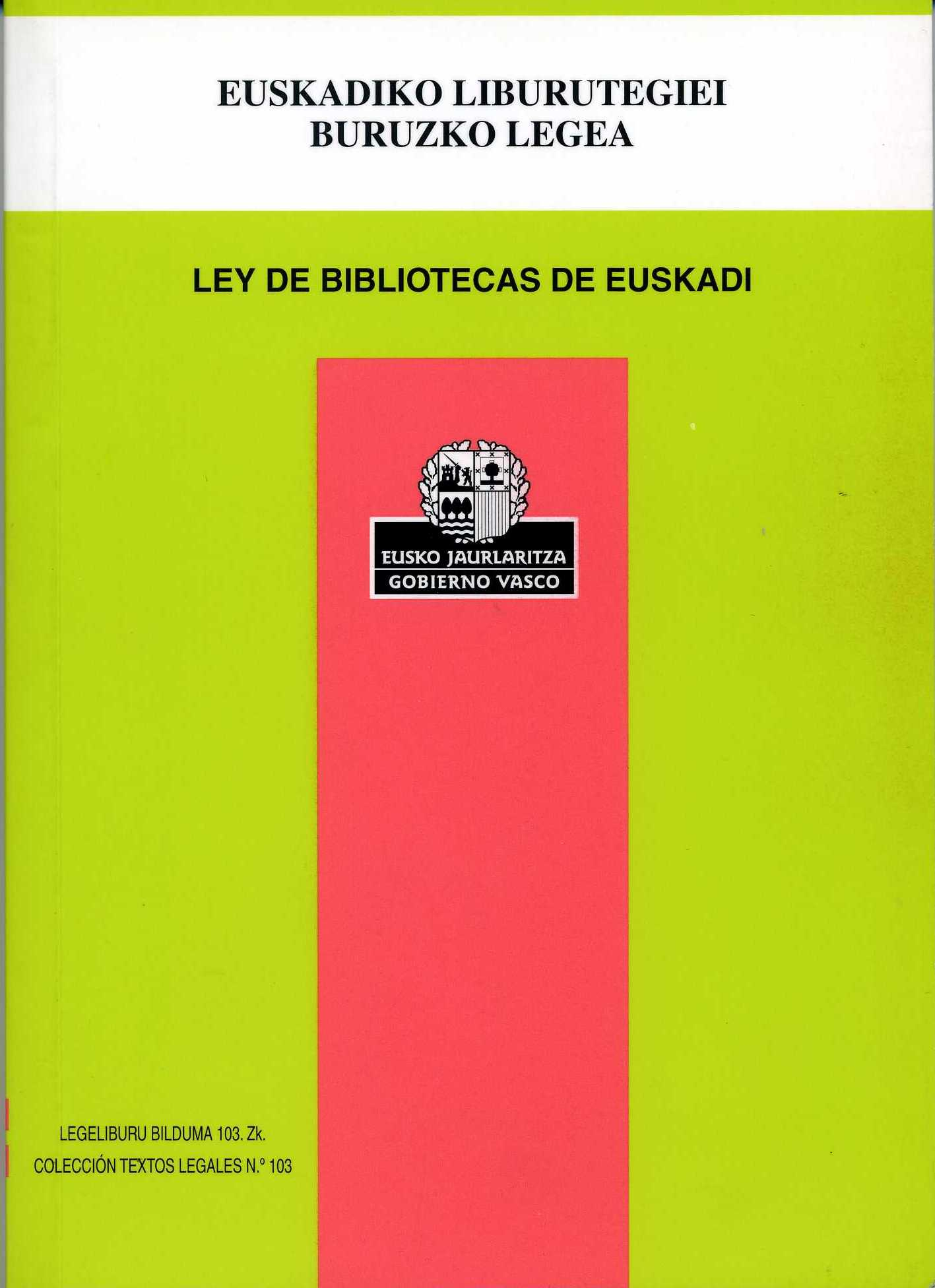 Ley de Bibliotecas